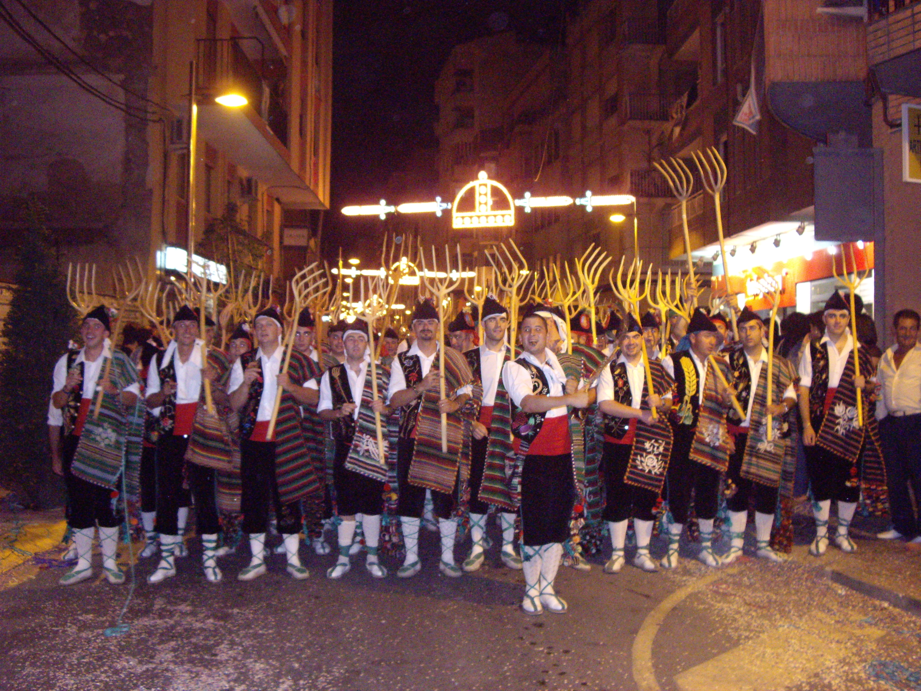 Maseros en La Entrada de Moros y Cristianos. Villena 2007. Cabo Jose Antonio Navarro Forte al mando de la escuadra denominada "Peña Huajolotes".